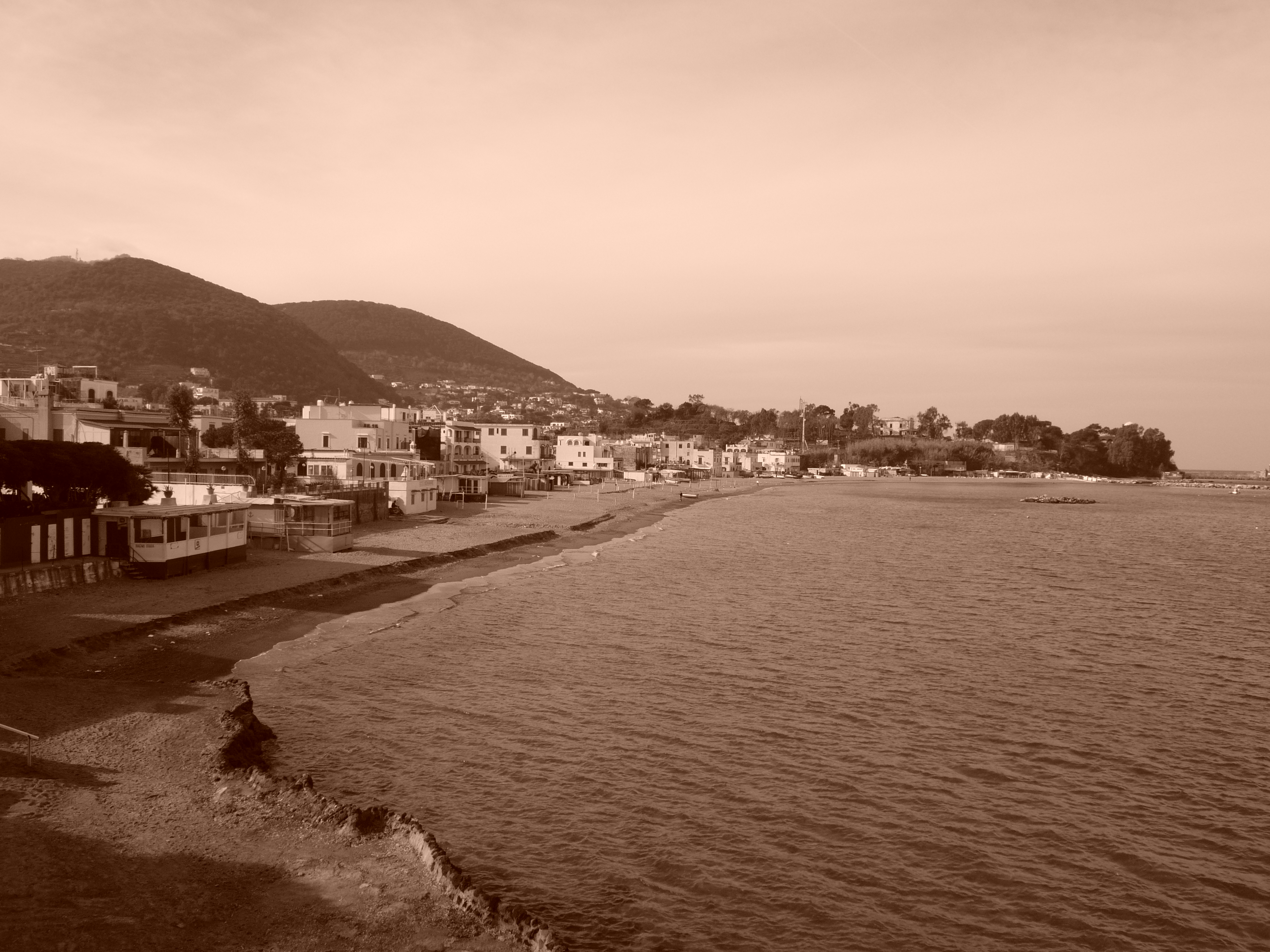 spiaggia di San Pietro nel comune di Ischia